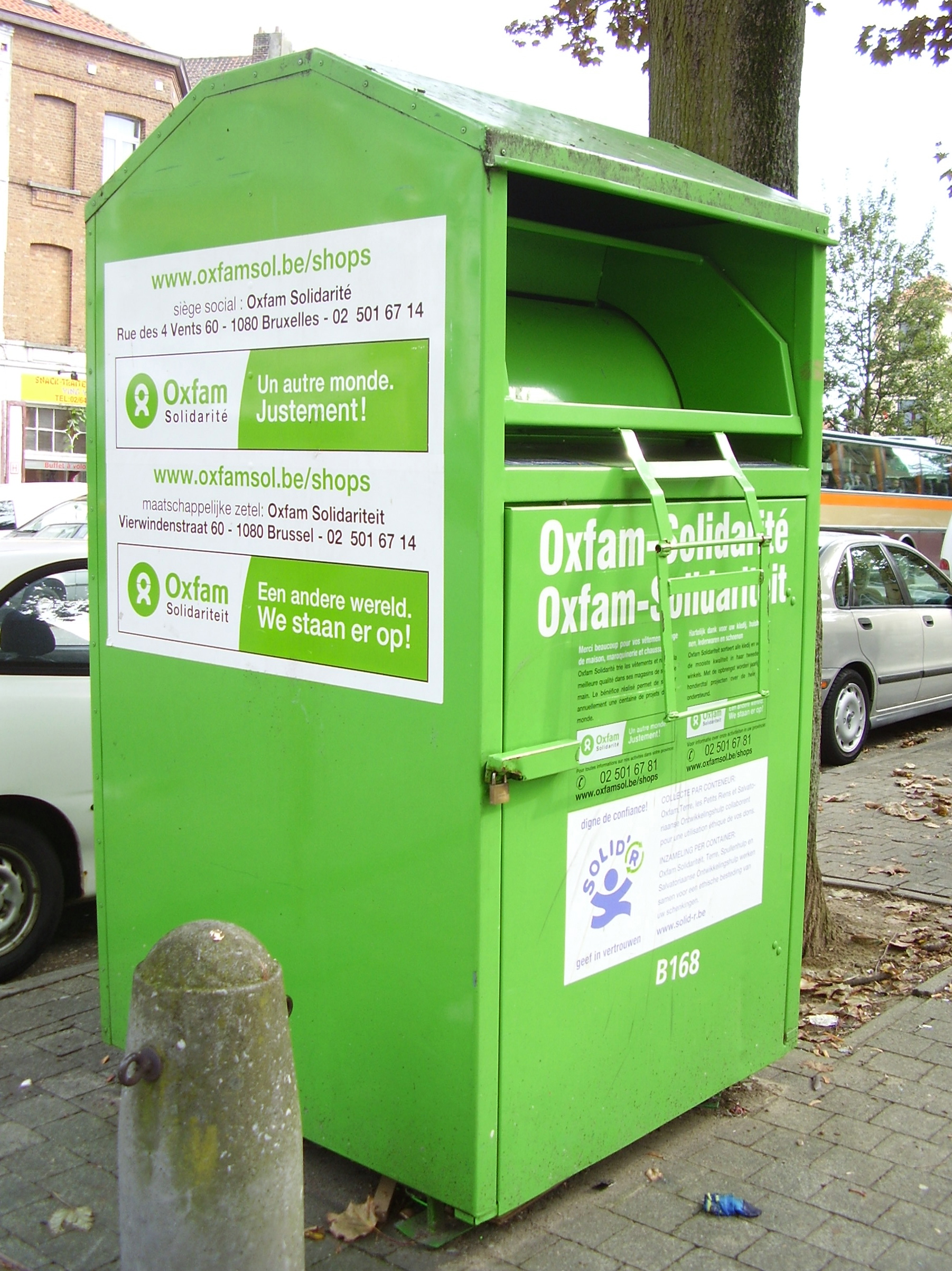 Description: Cabine Oxfam pour la récolte de vêtements réutilisables (Bruxelles - Belgique) Author: User:Ben2 Date of creation: 04 octobre 2006 Source: Photo personnelle